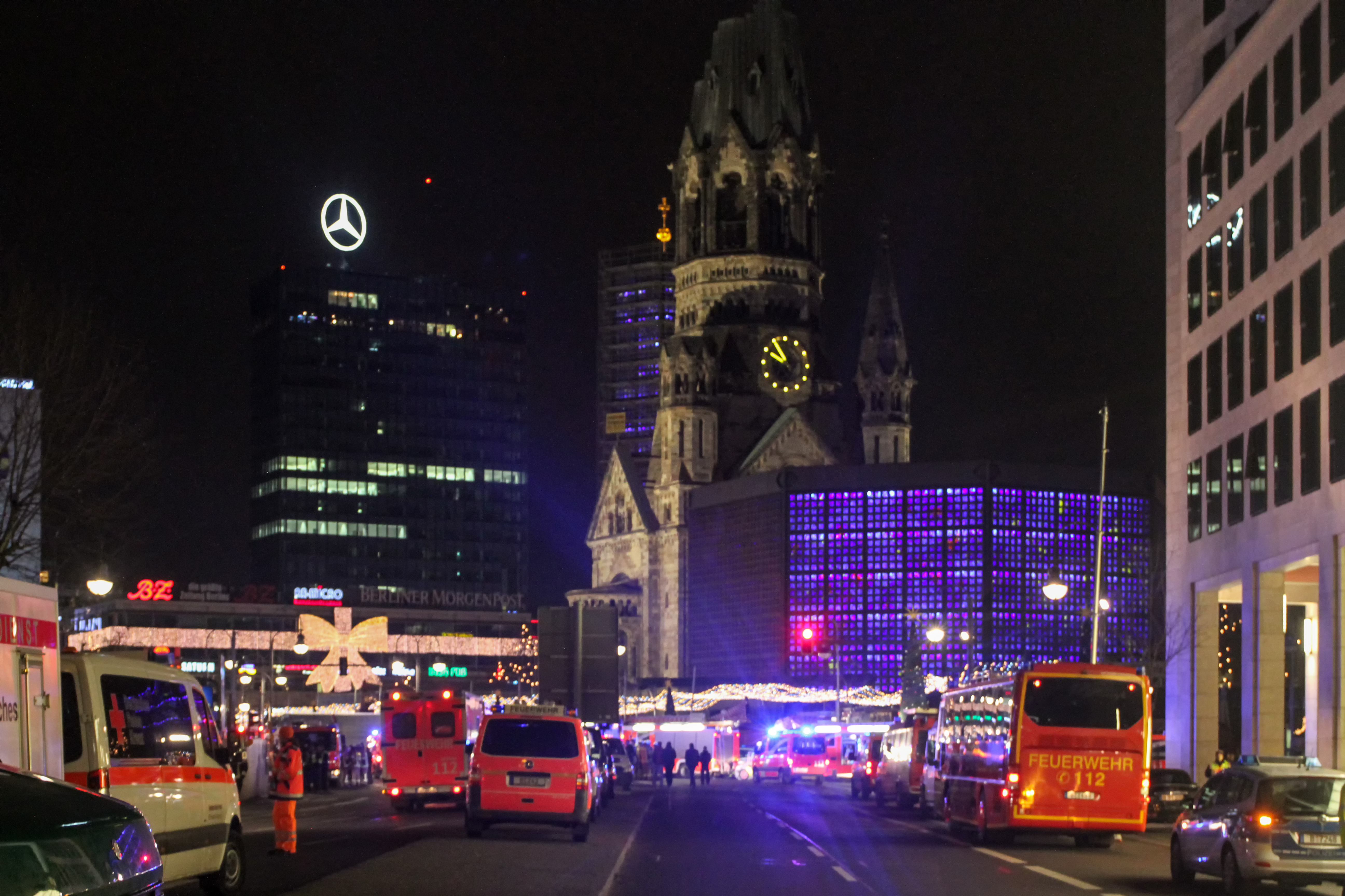 Einsatz von Rettungskräften nach dem Vorfall am Weihnachtsmarkt am Berliner Breitscheidplatz am Abend des 19. Dezember 2016.Blick von der Hardenbergstraße auf den Weihnachtsmarkt am Breitscheidplatz, mittig die Kaiser-Wilhelm-Gedächtniskirche, hinten links das Europacenter, vorne rechts das Hotel Waldorf Astoria Berlin.